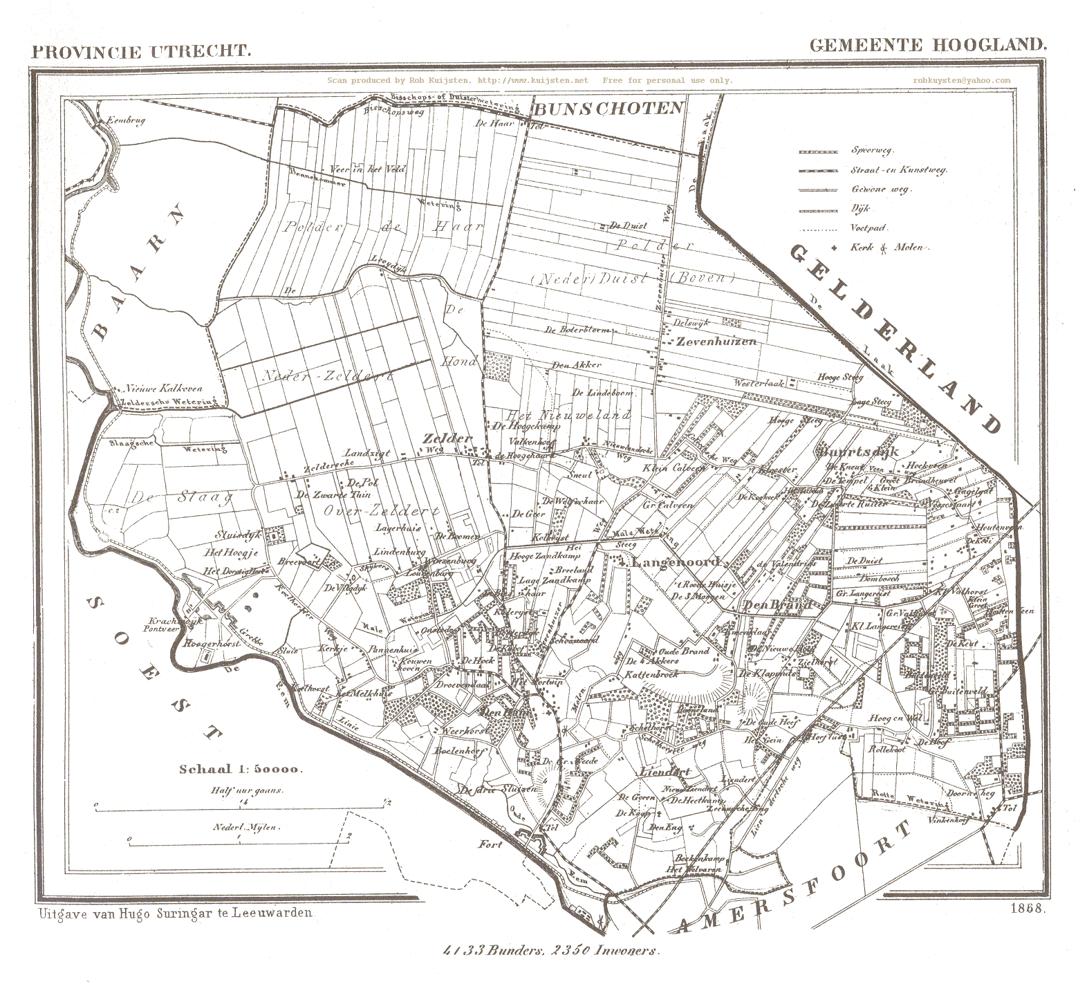 Kaart van Hoogland (Amersfoort) uit Gemeente Atlas van Nederland, J. Kuyper 1865-1870, Uitgave Hugo Suringar Leeuwarden.